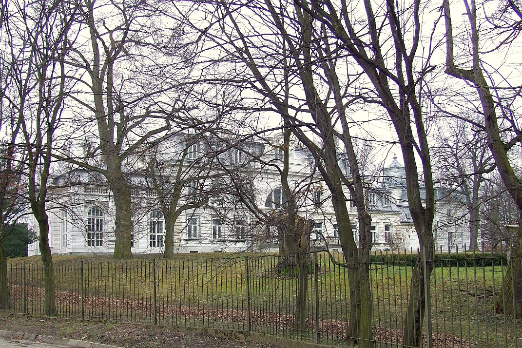 Pałac w Zaborowie. Dawny "Dom Dziennikarza", zagrał pałac w Koborowie, w serialu "Kariera Nikodema Dyzmy".